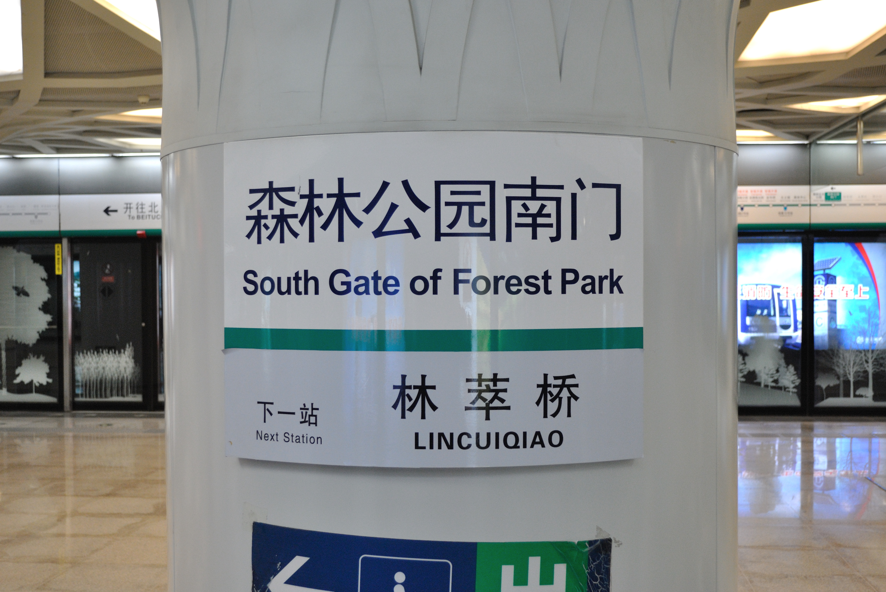 森林公园南门站站牌